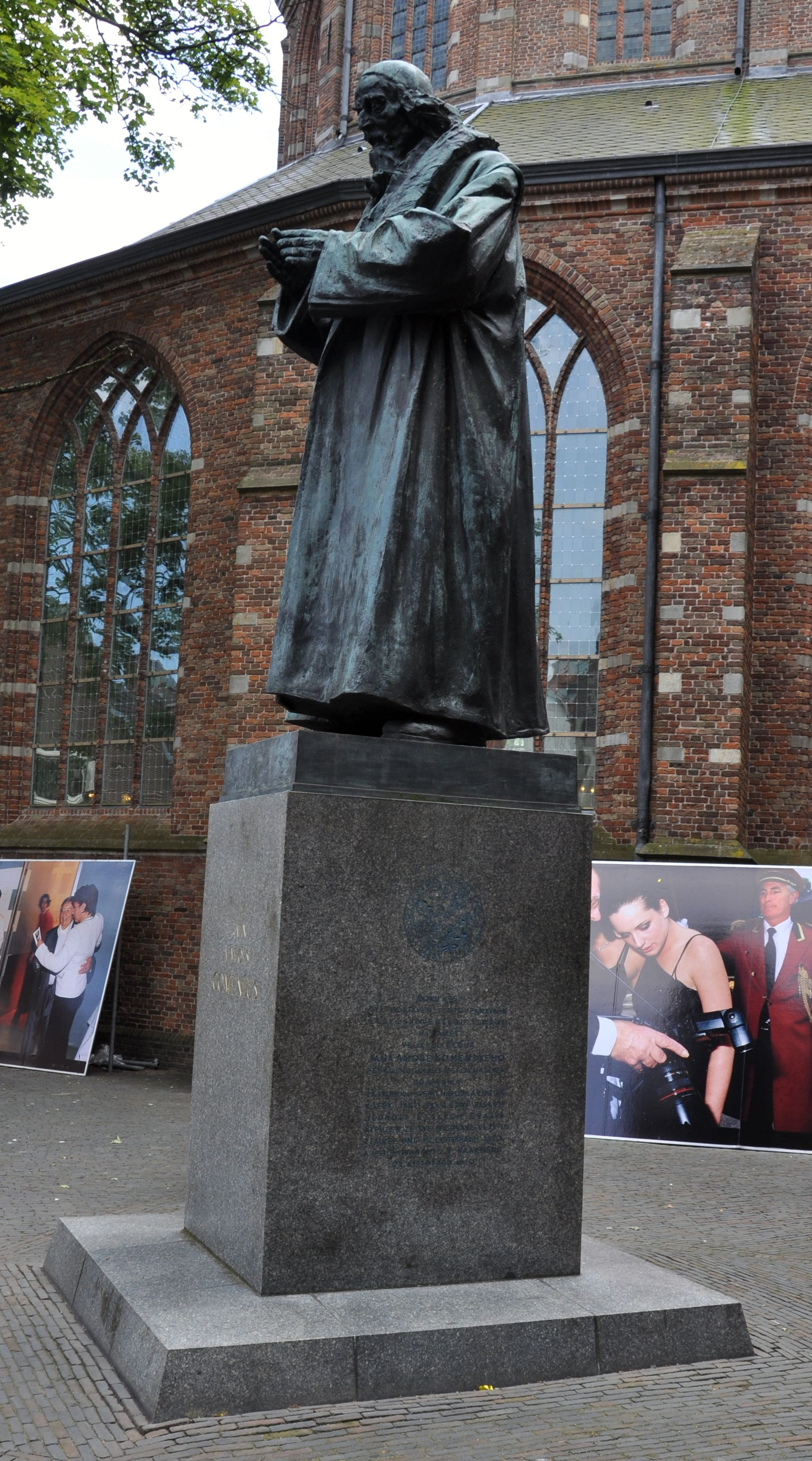 Standbeeld van Comenius bij de Grote kerk van Naarden met op de achtergrond enkele foto's van het FotoFestival Naarden.